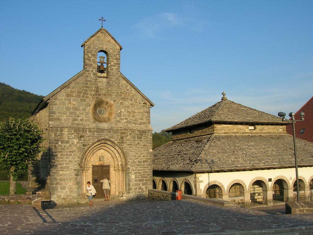 Capilla de Santiago y capilla del Espíritu Santo, Roncesvalles, Navarra